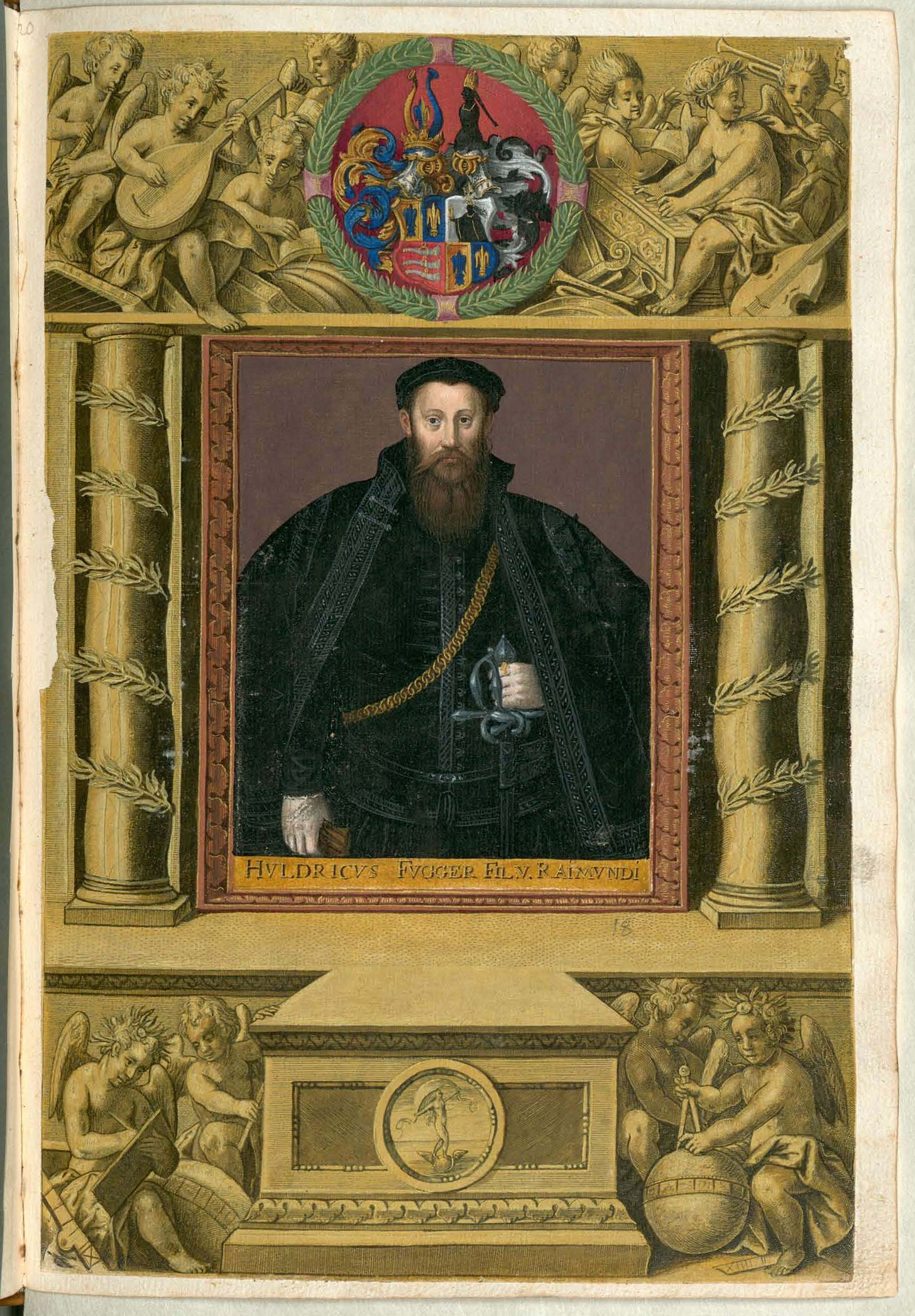 Fuggerorum et Fuggerarum imagines wurde 1588 von Philipp Eduard Fugger beim Kupferstecher Dominicus Custos in Auftrag gegeben. Das Werk enthält mit Aquarell- und Gouache-Farbe kolorierte Stiche der Mitglieder der Fugger von der Lilie. Der Druck von 1618 stellt das einzige kolorierte Exemplar dar. Ulrich Fugger (1526-1584), Sohn Raymund Fuggers (1489-1535)